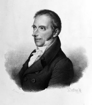 Johann Georg Friedrich von Friesen (1757-1824), deutscher Rittergutsbesitzer, Oberkammerherr, Geheimer Rat und Oberaufseher der Dresdner Kunstsammlungen und Bibliothek